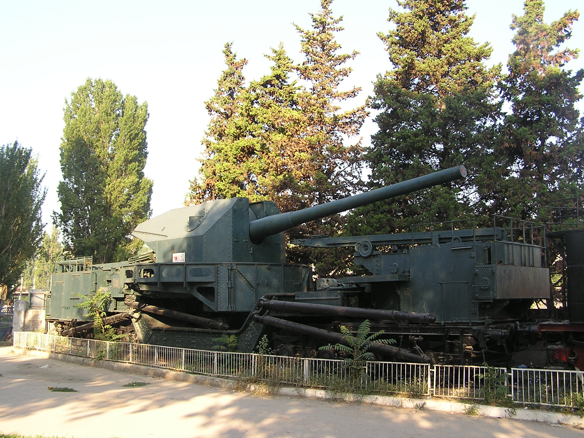 Бронепоезд «Железняков» на стоянке в Севастополе. Транспортер ТМ-1-180